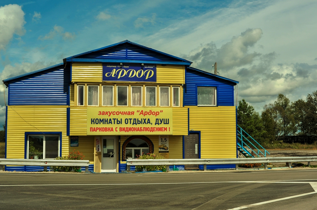 Трасса Амур Р297, придорожный комплекс